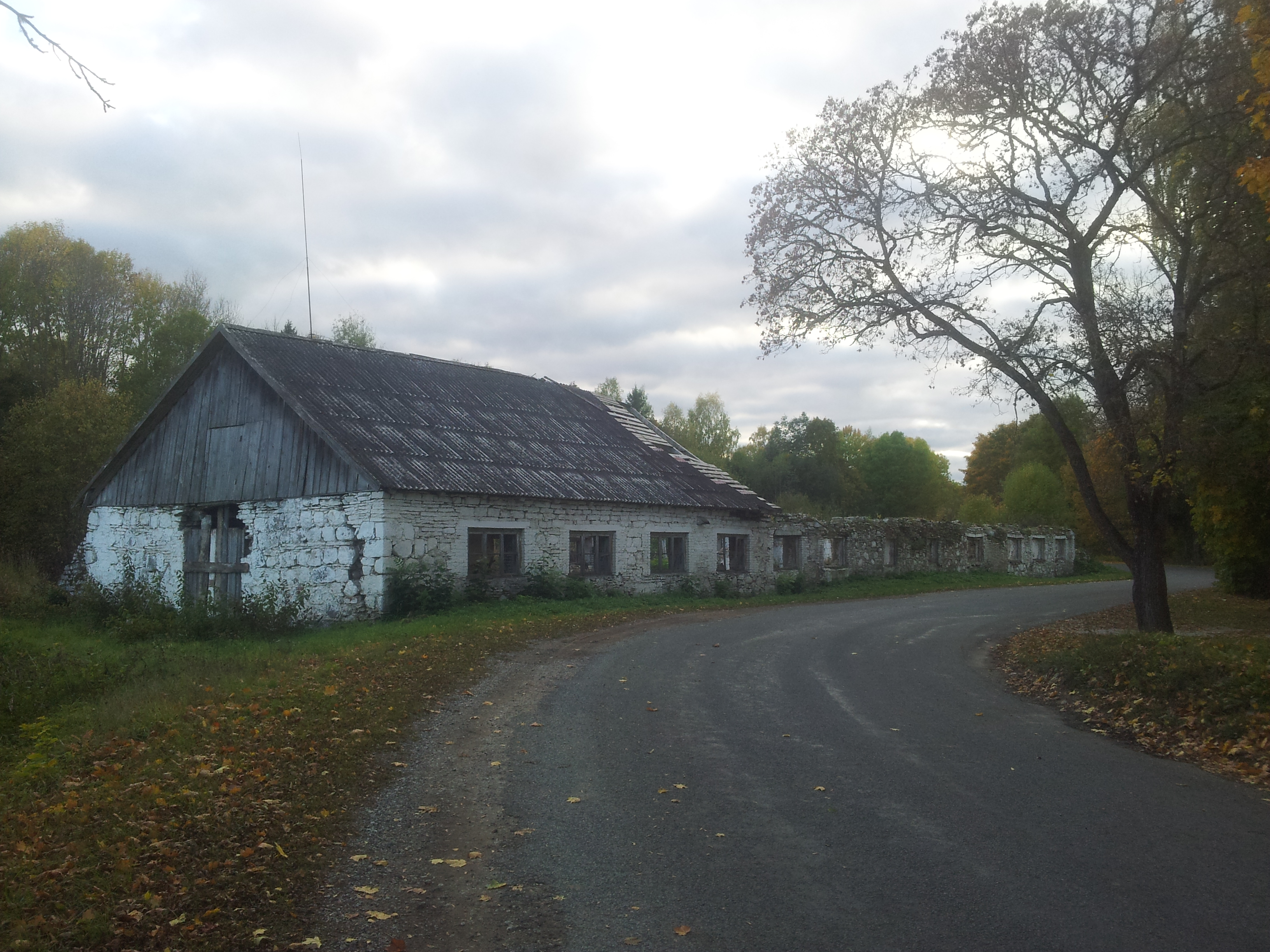 Aaspere mõisa karjalaut